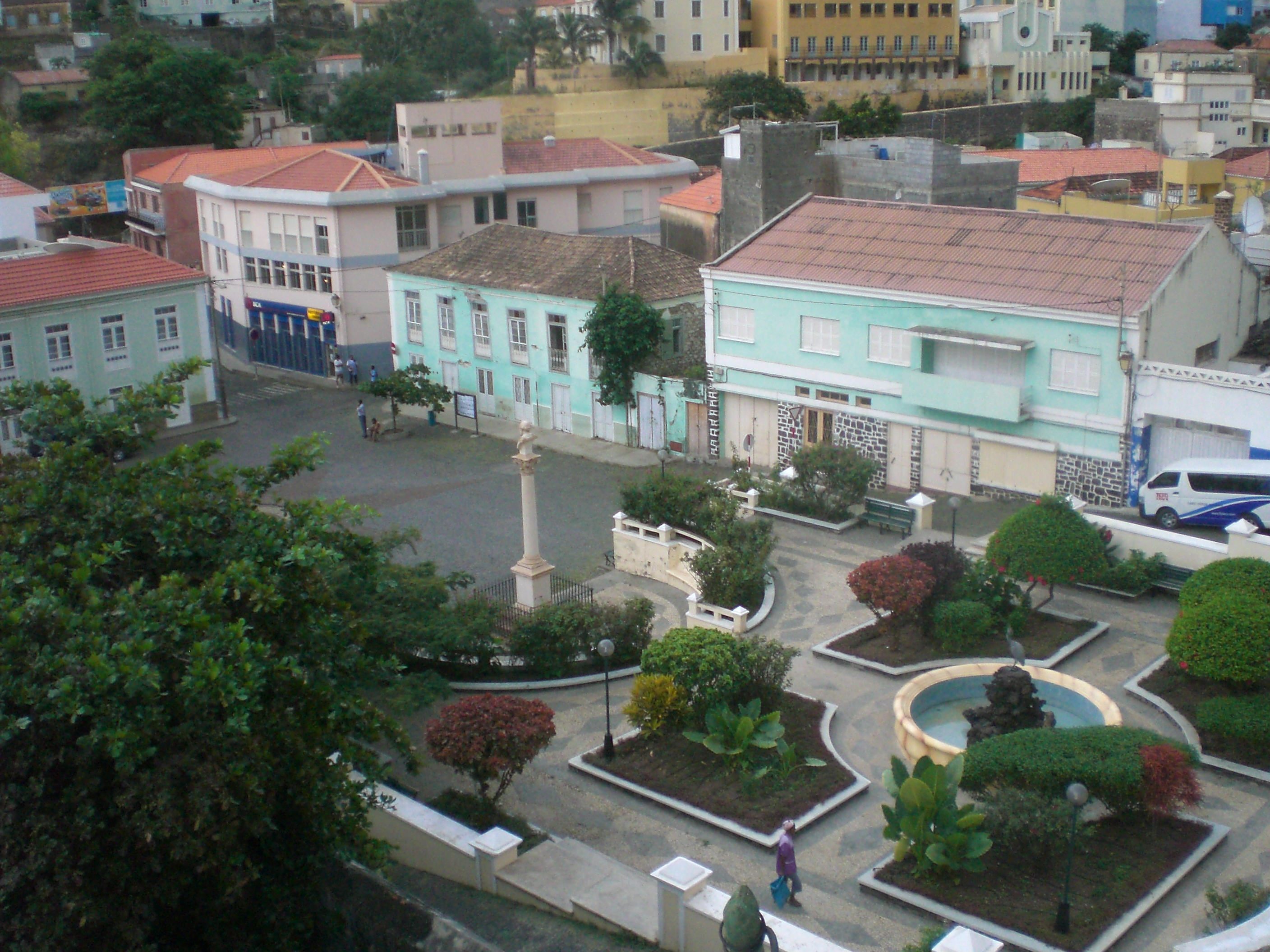 Vista de la plaza de Ribeira Brava